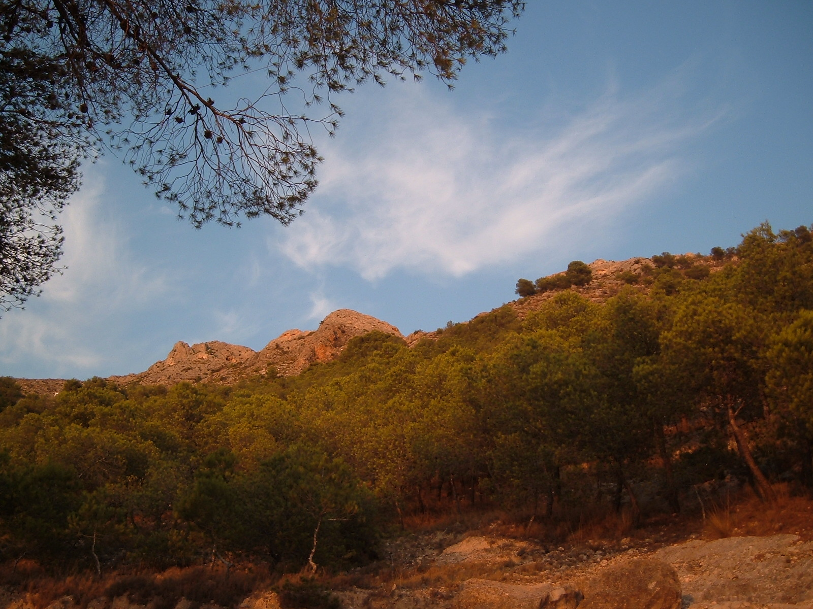 Sierra de la Villa de Villena hacia el atarceder. En lo alto pueden distinguirse las ruinas del Castillo de Salvatierra.